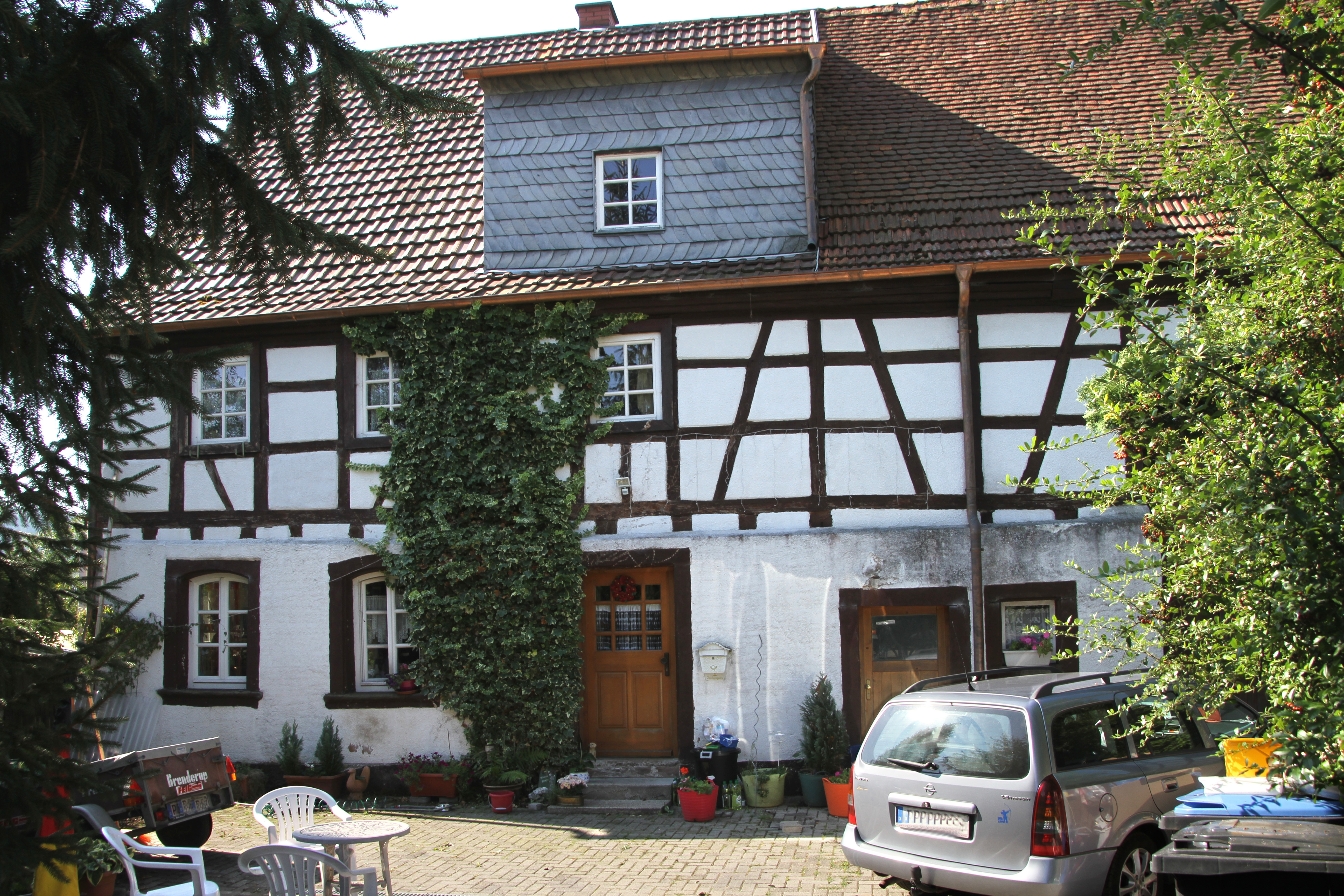 Münchweiler an der Rodalb, Hanauer Straße 17; Fachwerk-Quereinhaus, teilweise massiv, Krüppelwalmdach, um 1800.